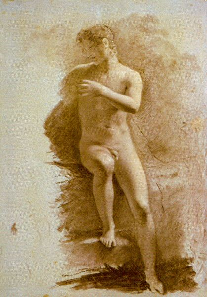 Nudo accademico maschile.